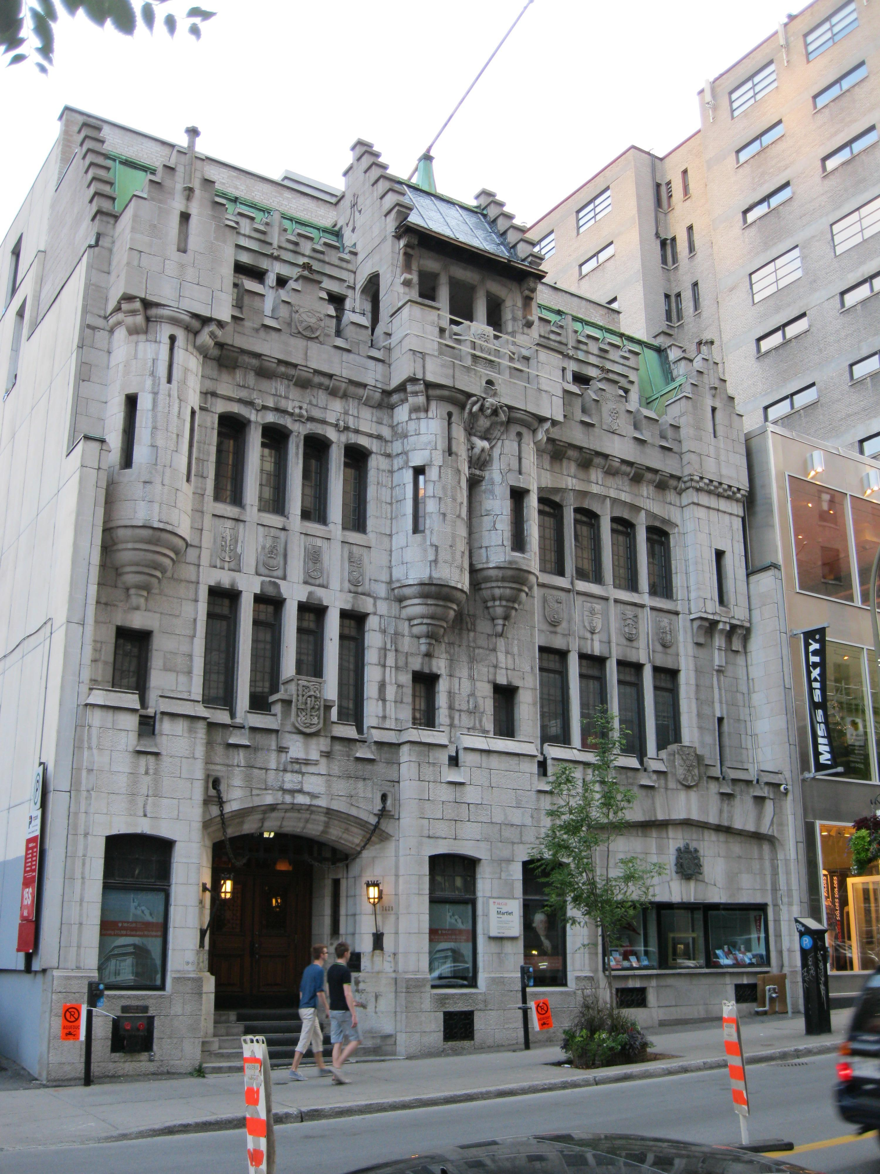 La Maison Seagram ou la Maison Martlet (1928), 1430 rue Peel, Montréal, Québec, Canada